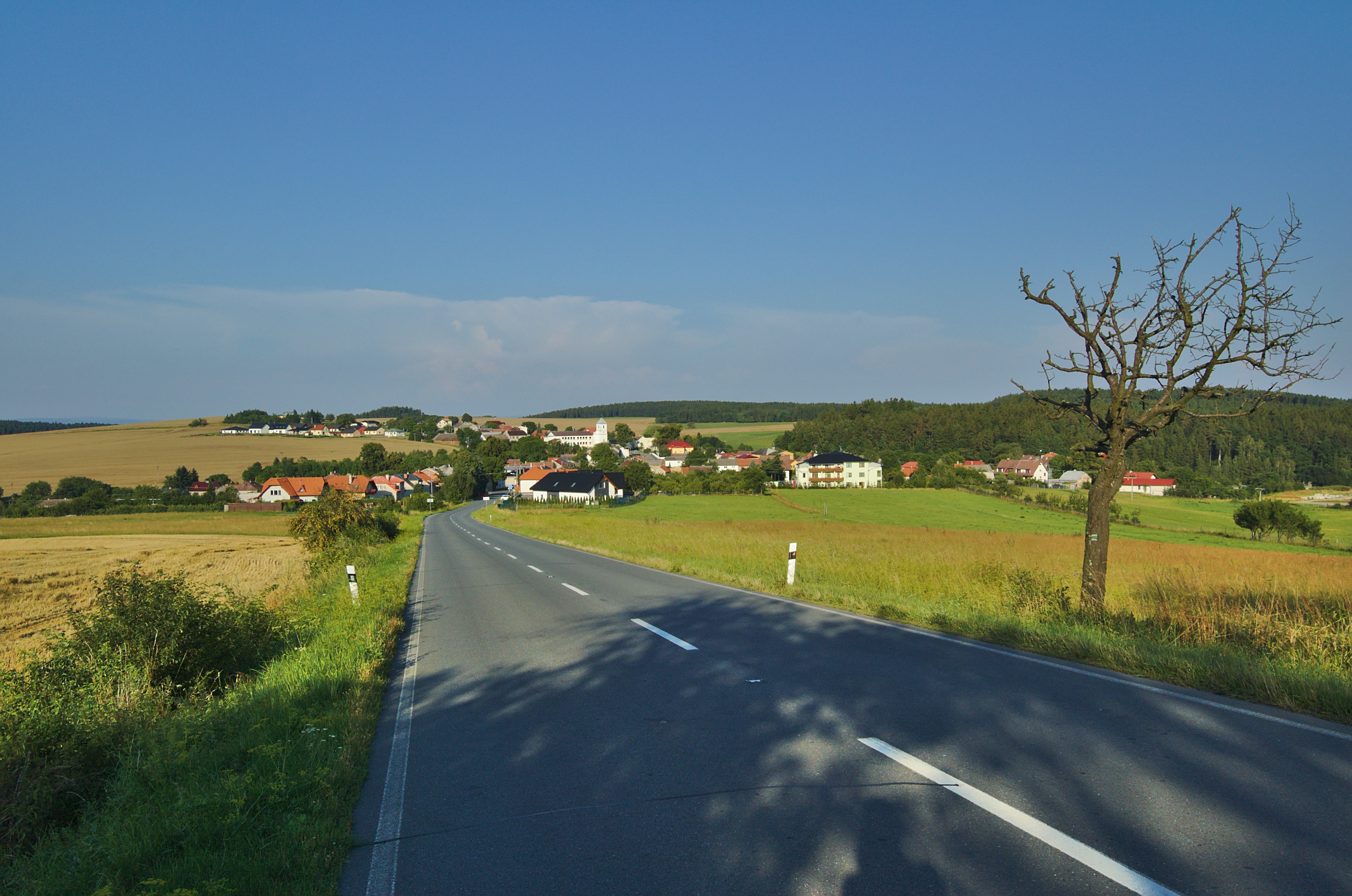 Pohled na vesnici od jihozápadu z hlavní silnice, Luká, okres Olomouc